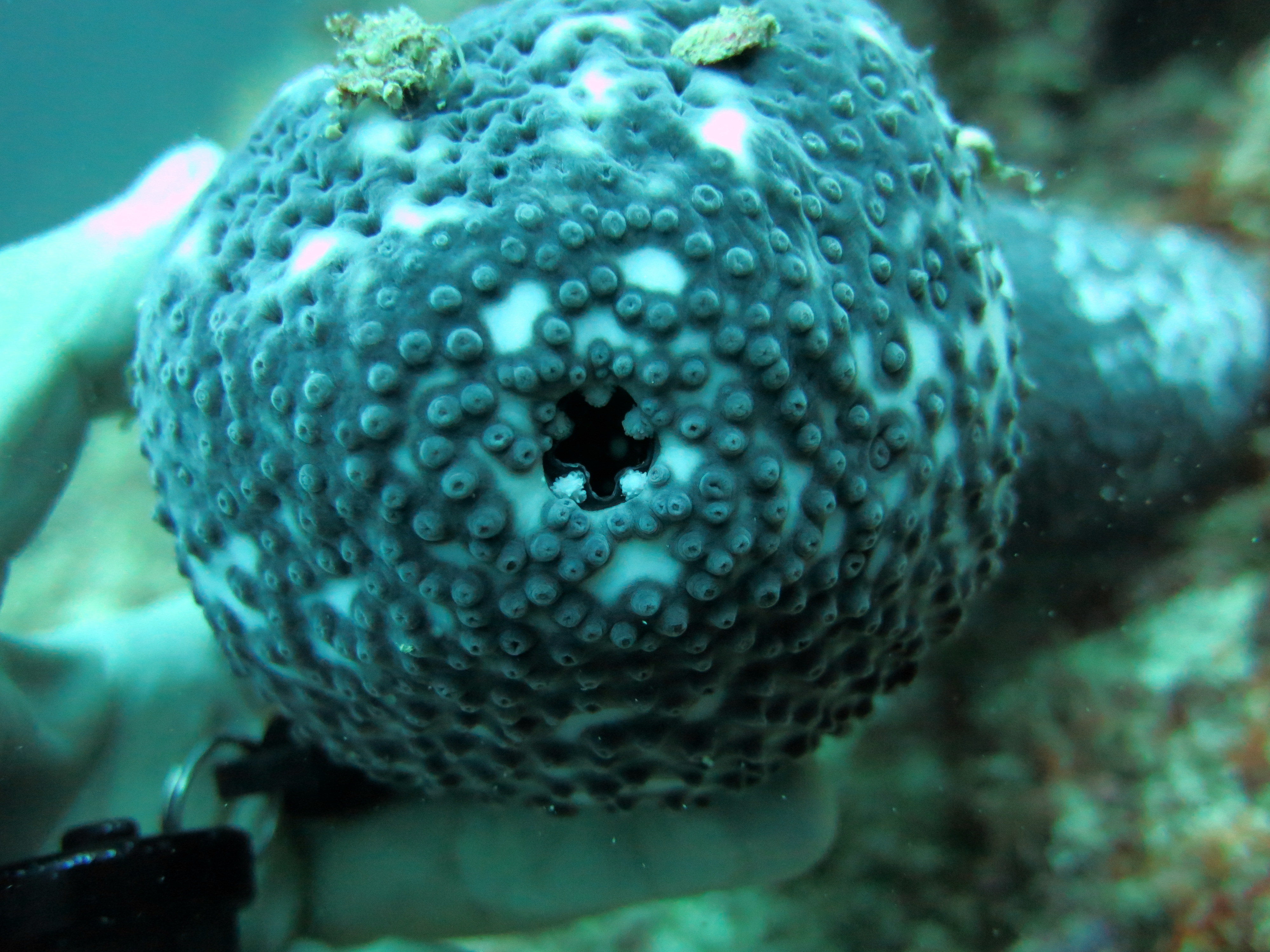 Gros plan sur les dents anales d'une holothurie à points bleus (Actinopyga caerulea) aux Maldives (atoll de Baa).